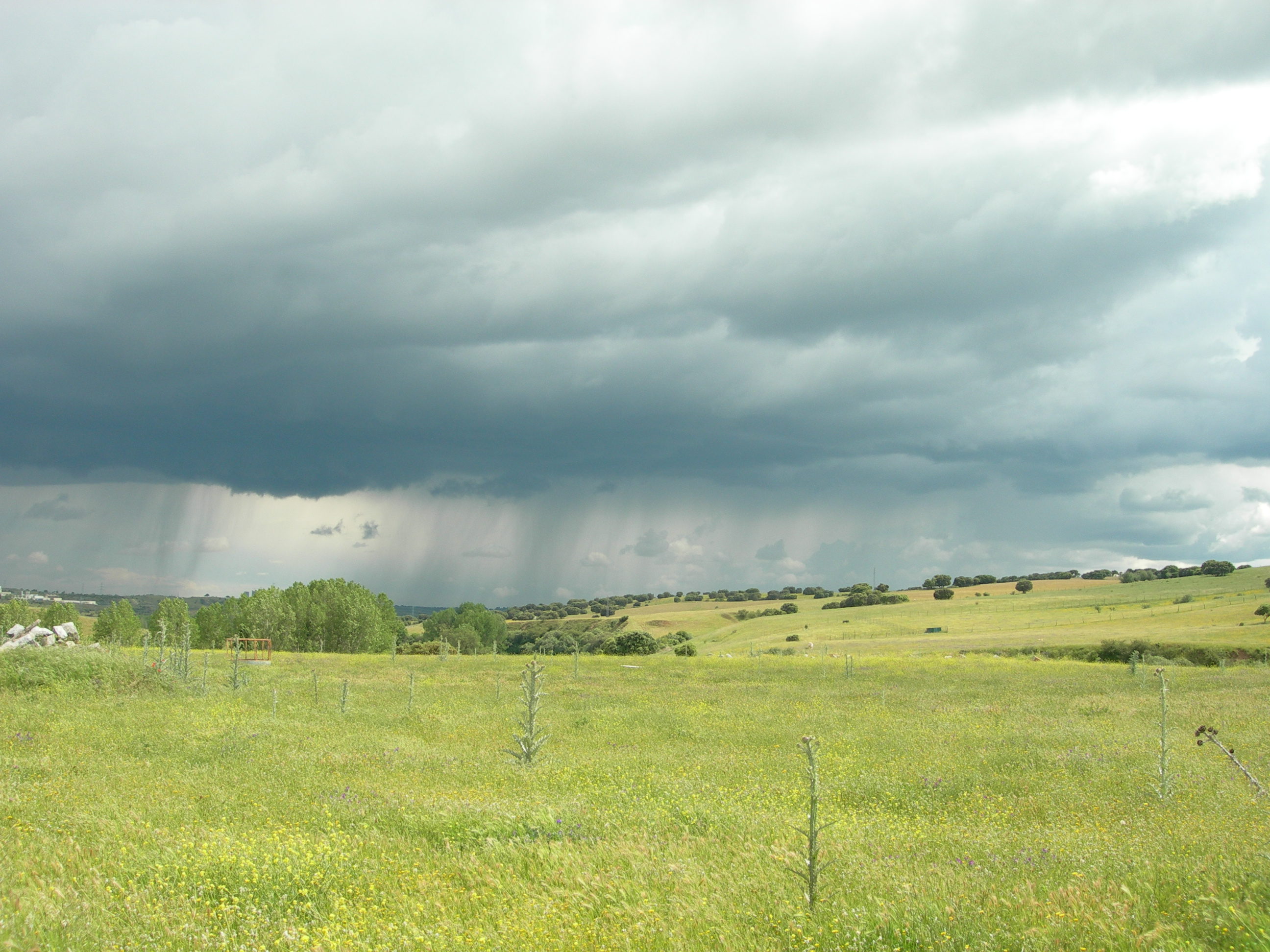 ... y nosotras bajo el sol